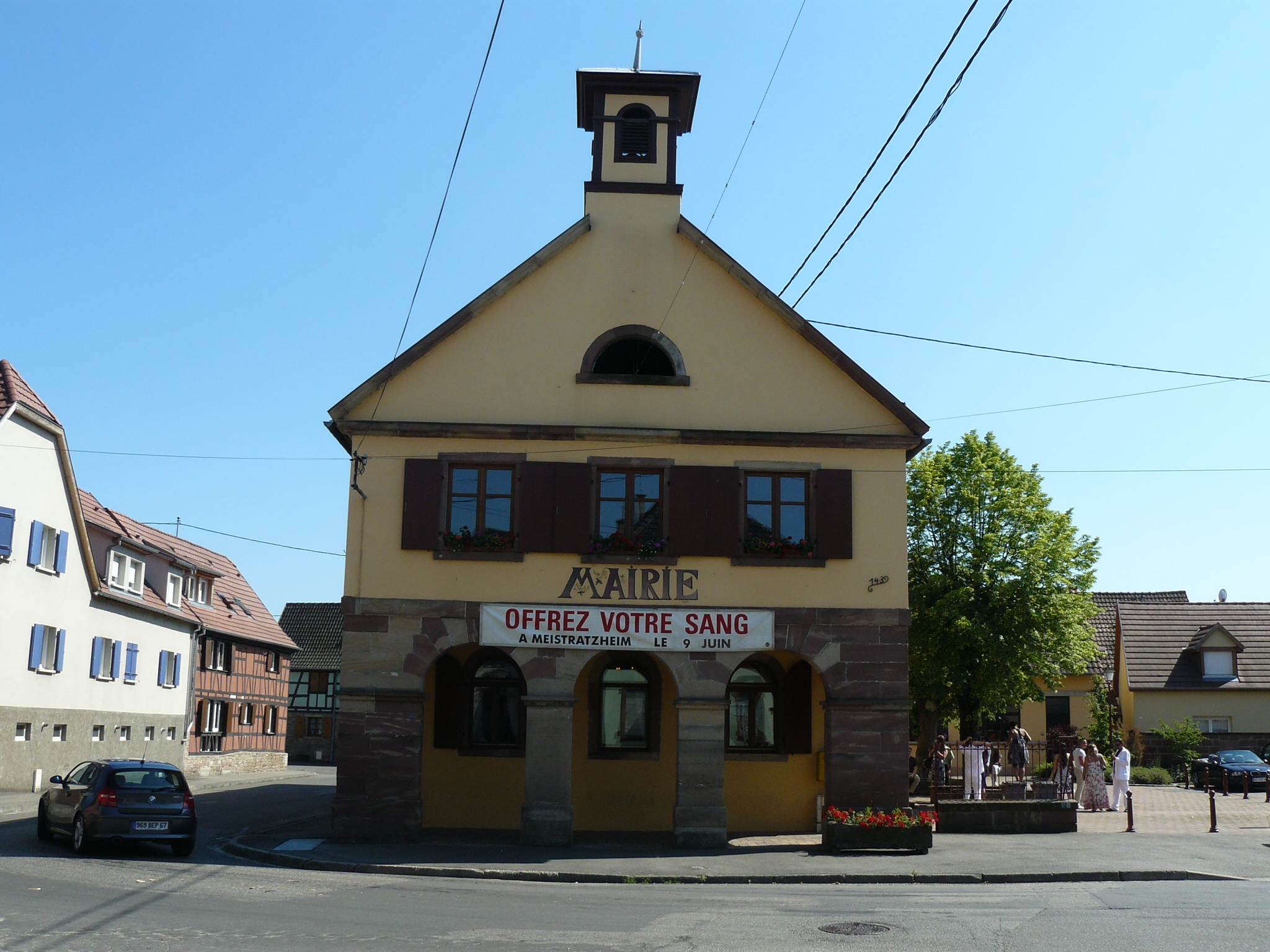 Mairie